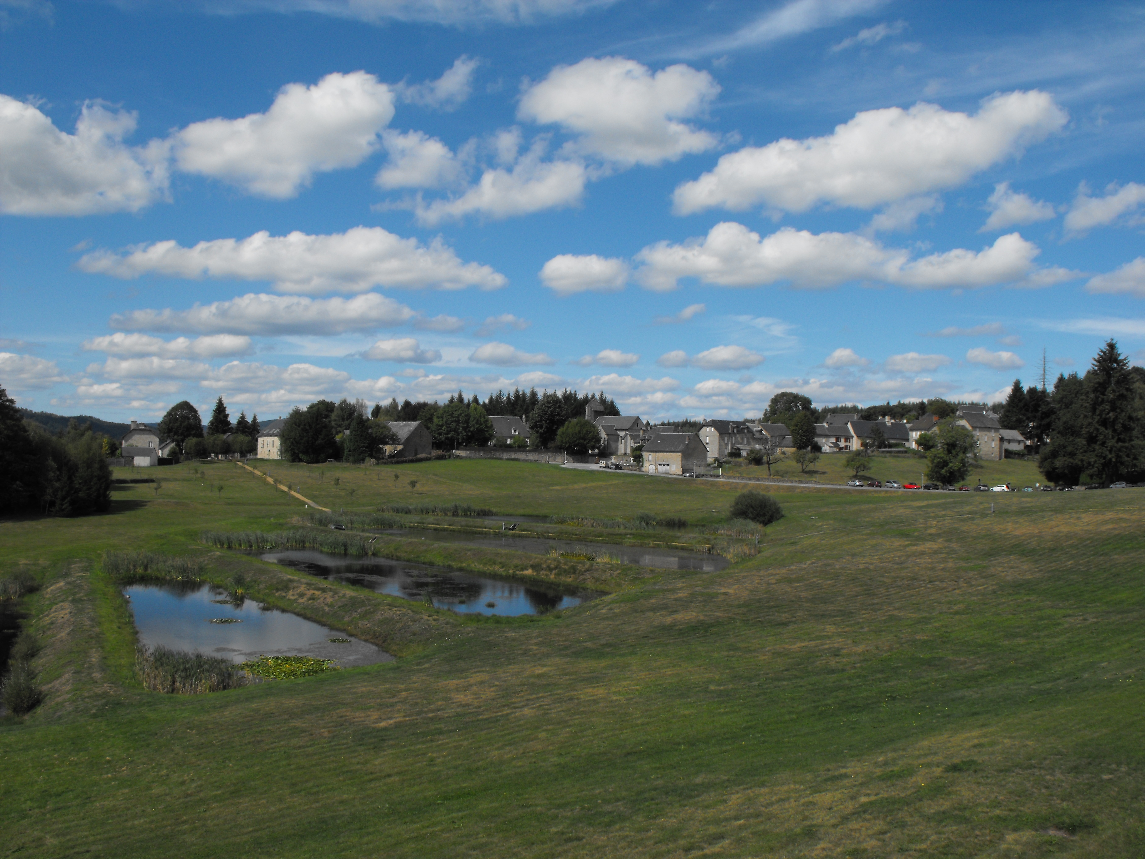 vue du village